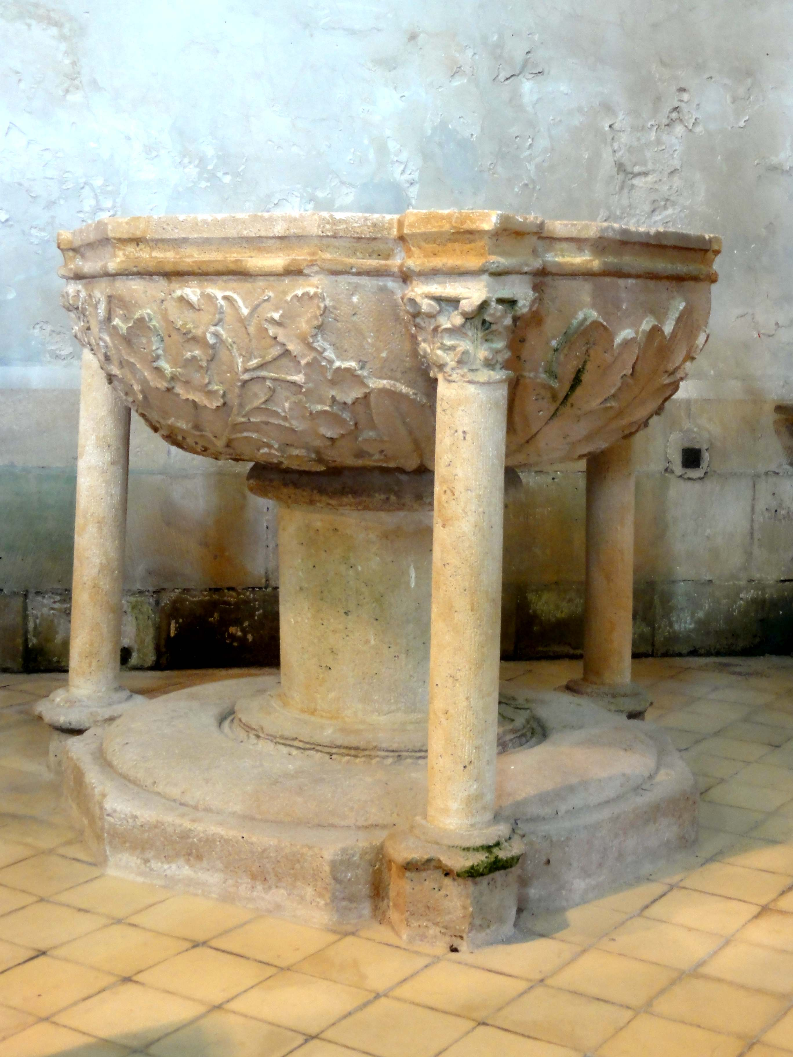 Fonts baptismaux.